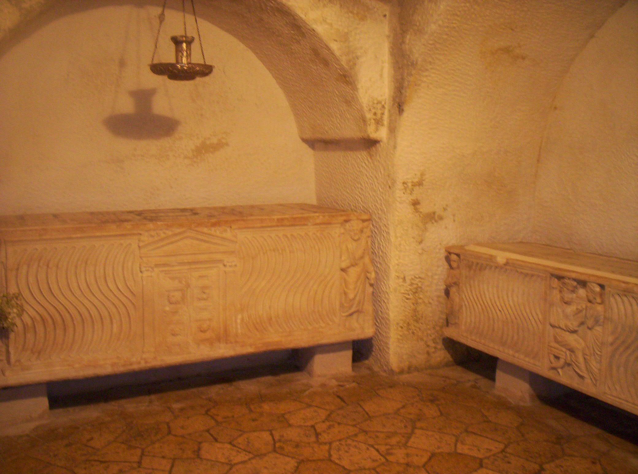 Porto Torres - tomba di S.Gavino e S.Gianuario nella cripta della basilica